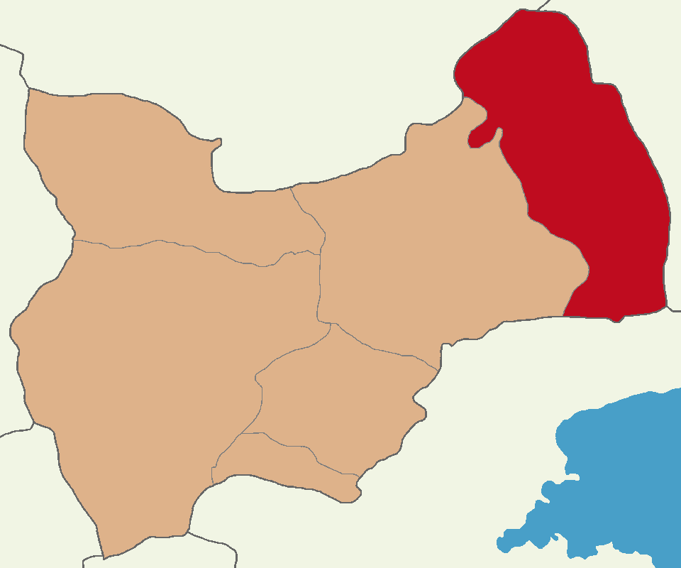 Malazgirt ilçesinin konumu